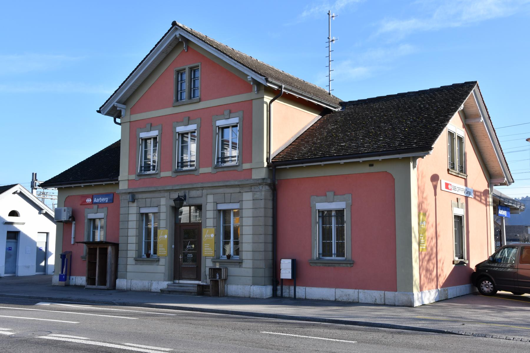 Bahnhof